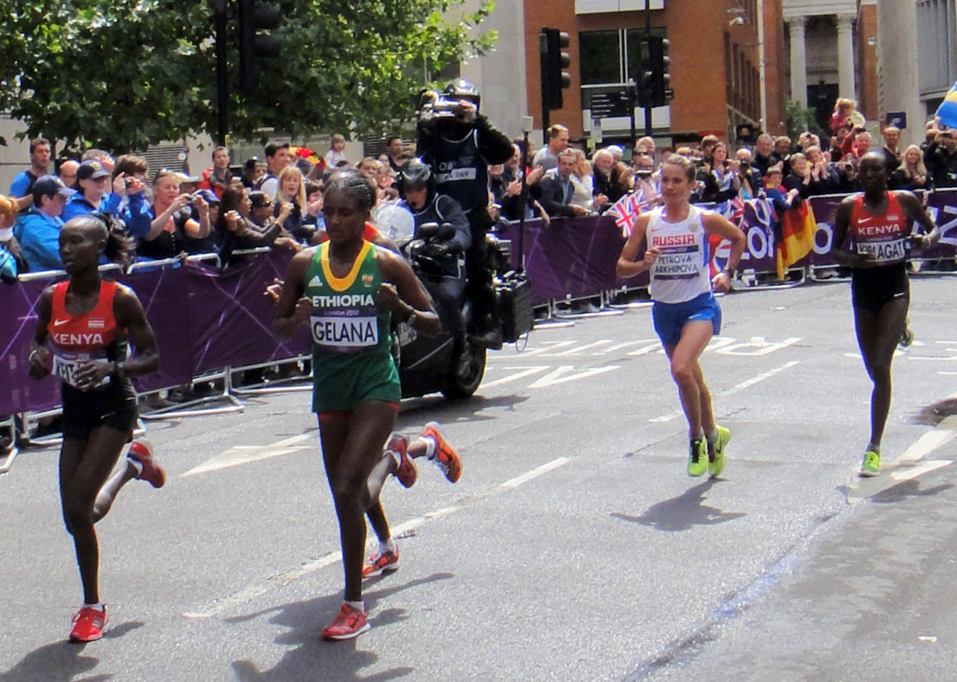 Mary Jepkosgei Keitany (Kenya), Tiki Gelana (Ethipoia), Tatyana Petrova Arkhipova (Russia), Edna Ngeringwony Kiplagat (Kenya) - London 2012 Women's Marathon